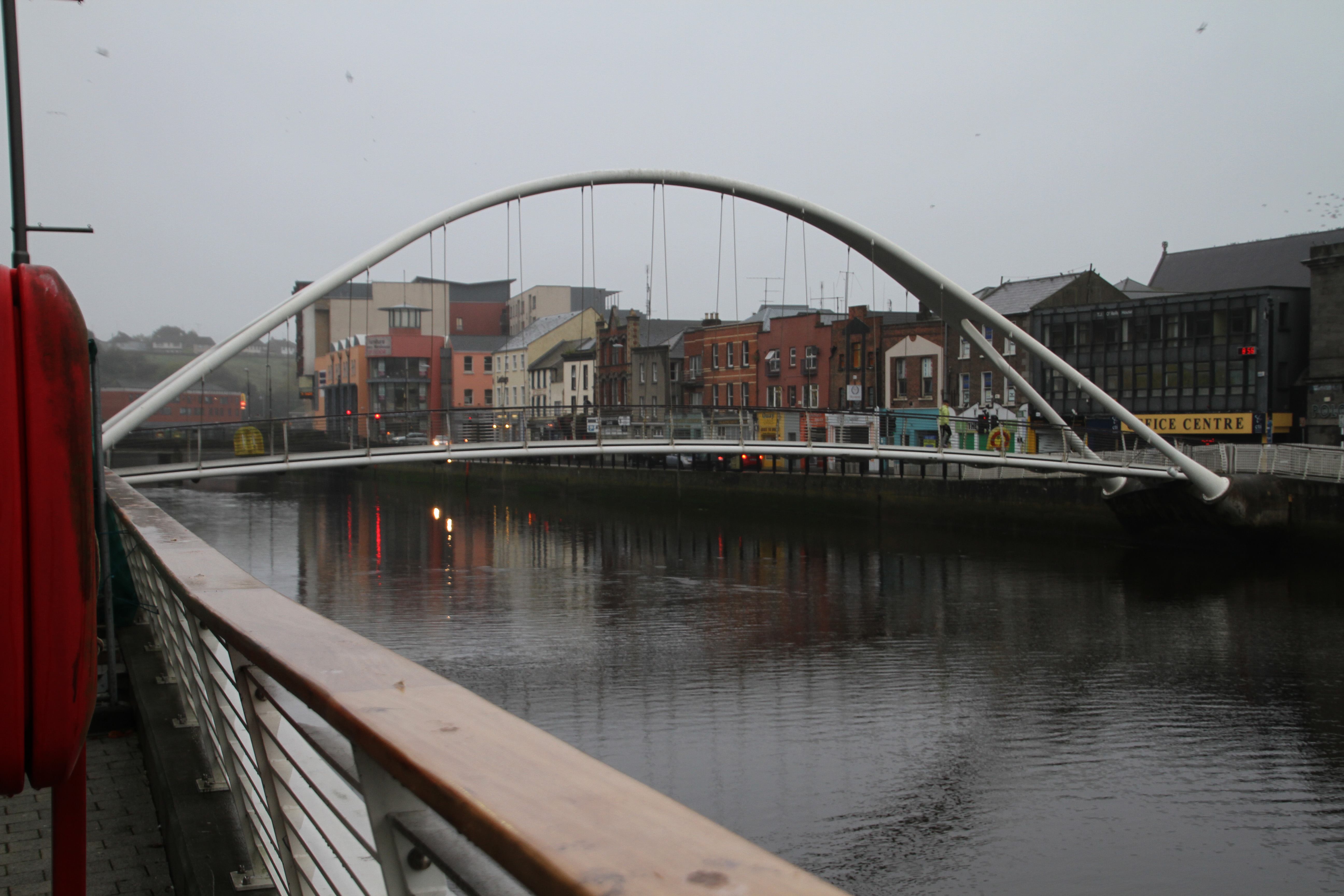 Lacy bridge in Drogheda